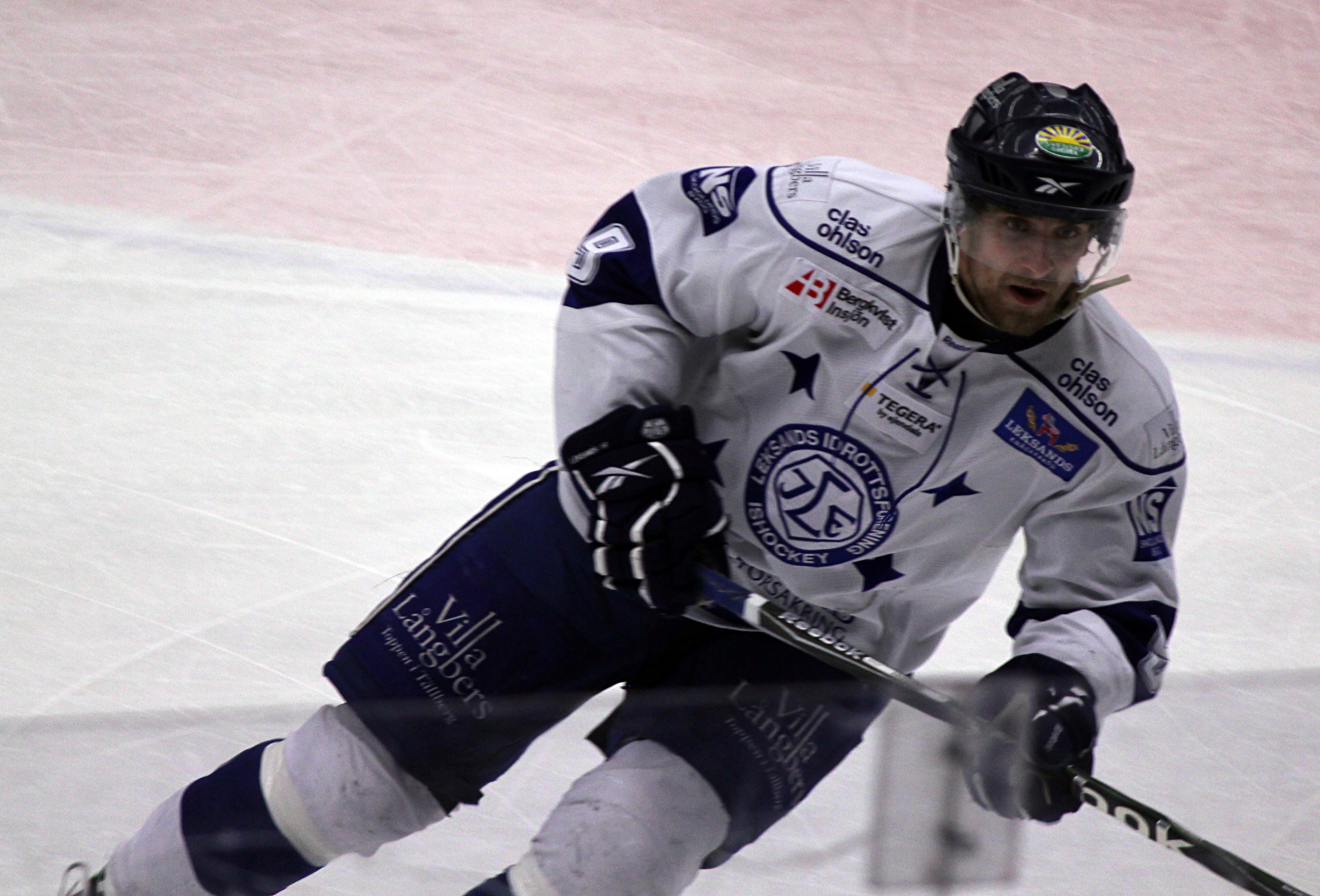 Johan Hägglund för Leksands IF mot VIK Västerås HK 29 januari 2011.